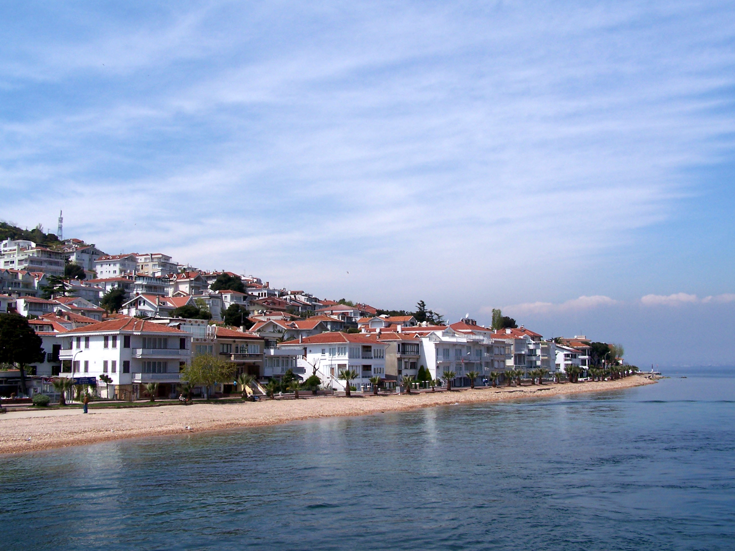 Shore of Kınalıada, Turkey